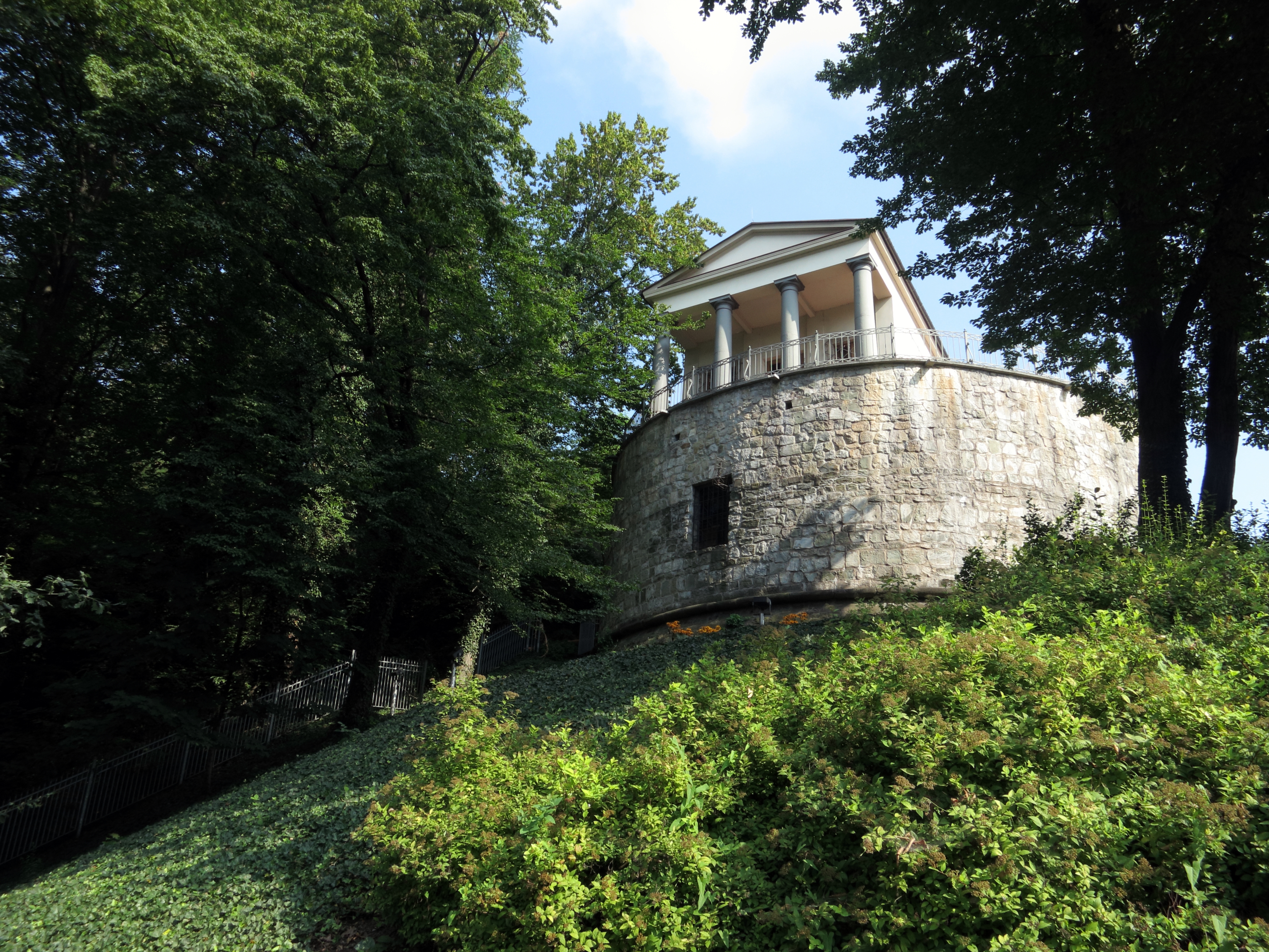 Cieszyn, Pałac Myśliwski Habsburgów od strony al. Piastowskiej, dawne łaźnie cesarskie Wikidata has entry Q28673123 with data related to this item.